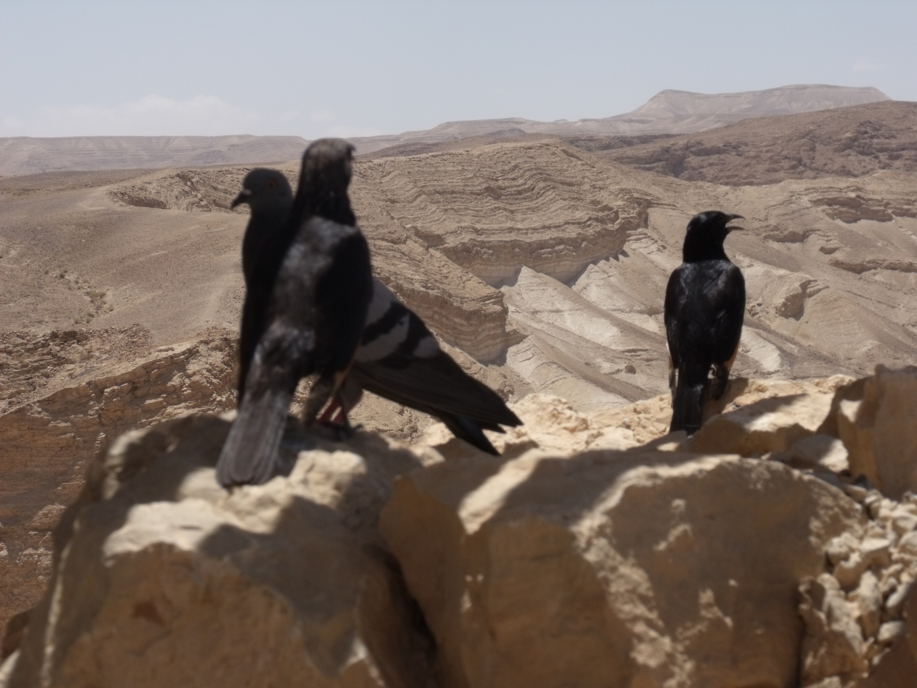 כמה יונים על אבנים בתצפית במצדה, זום.